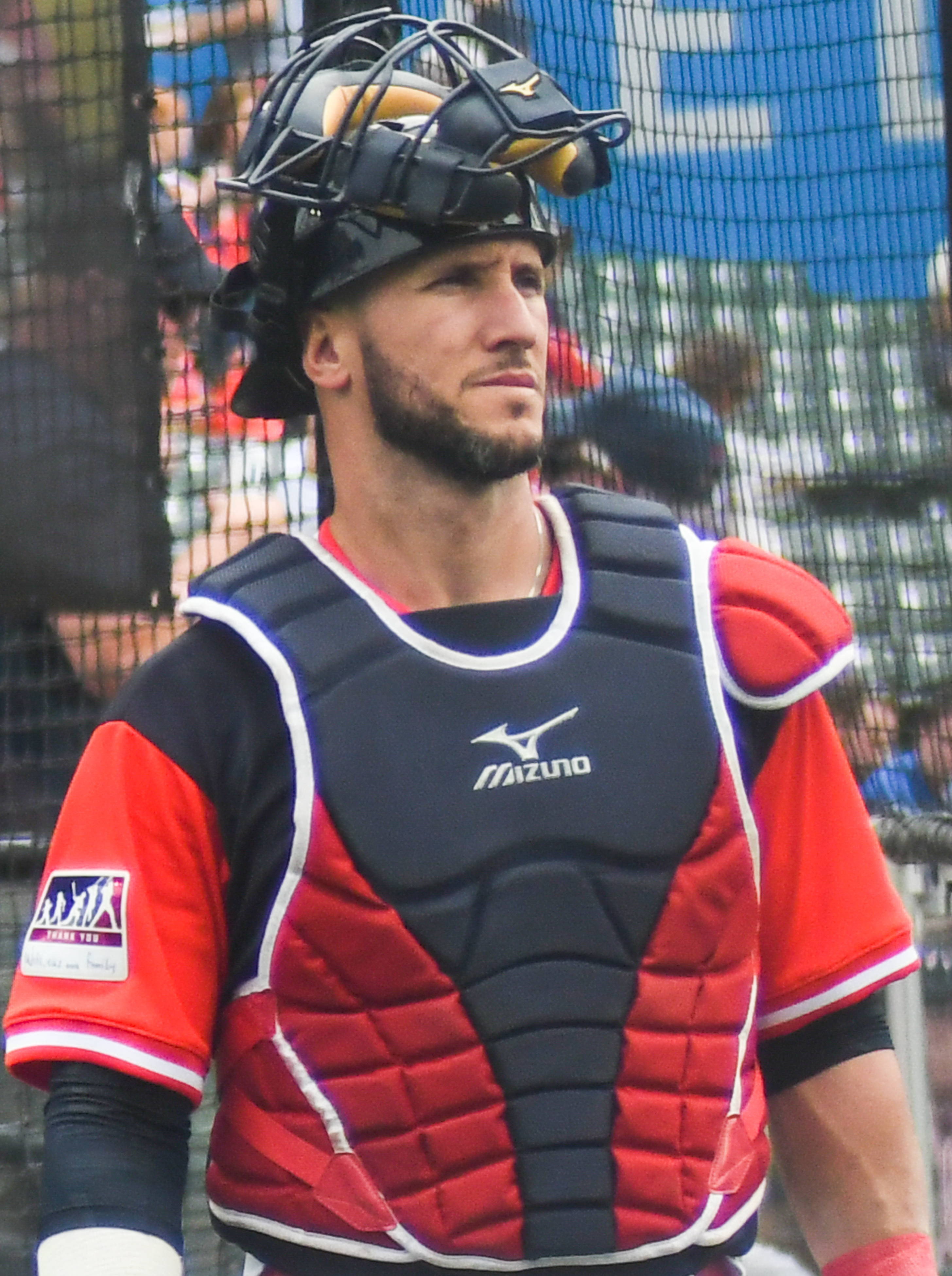 Yan Gomes